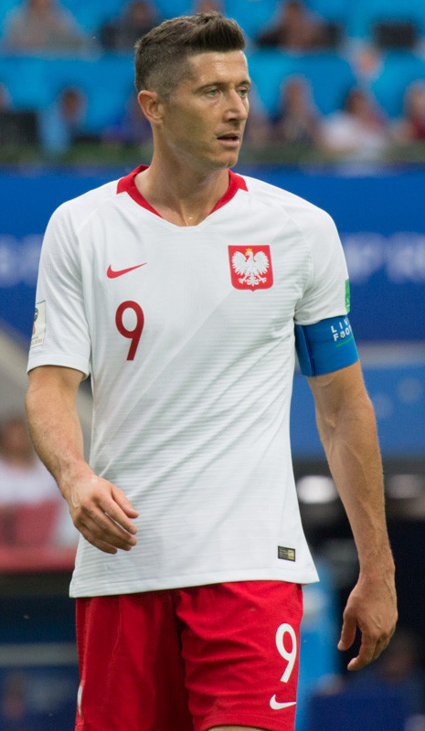 Польша неожиданно проиграла Сенегалу